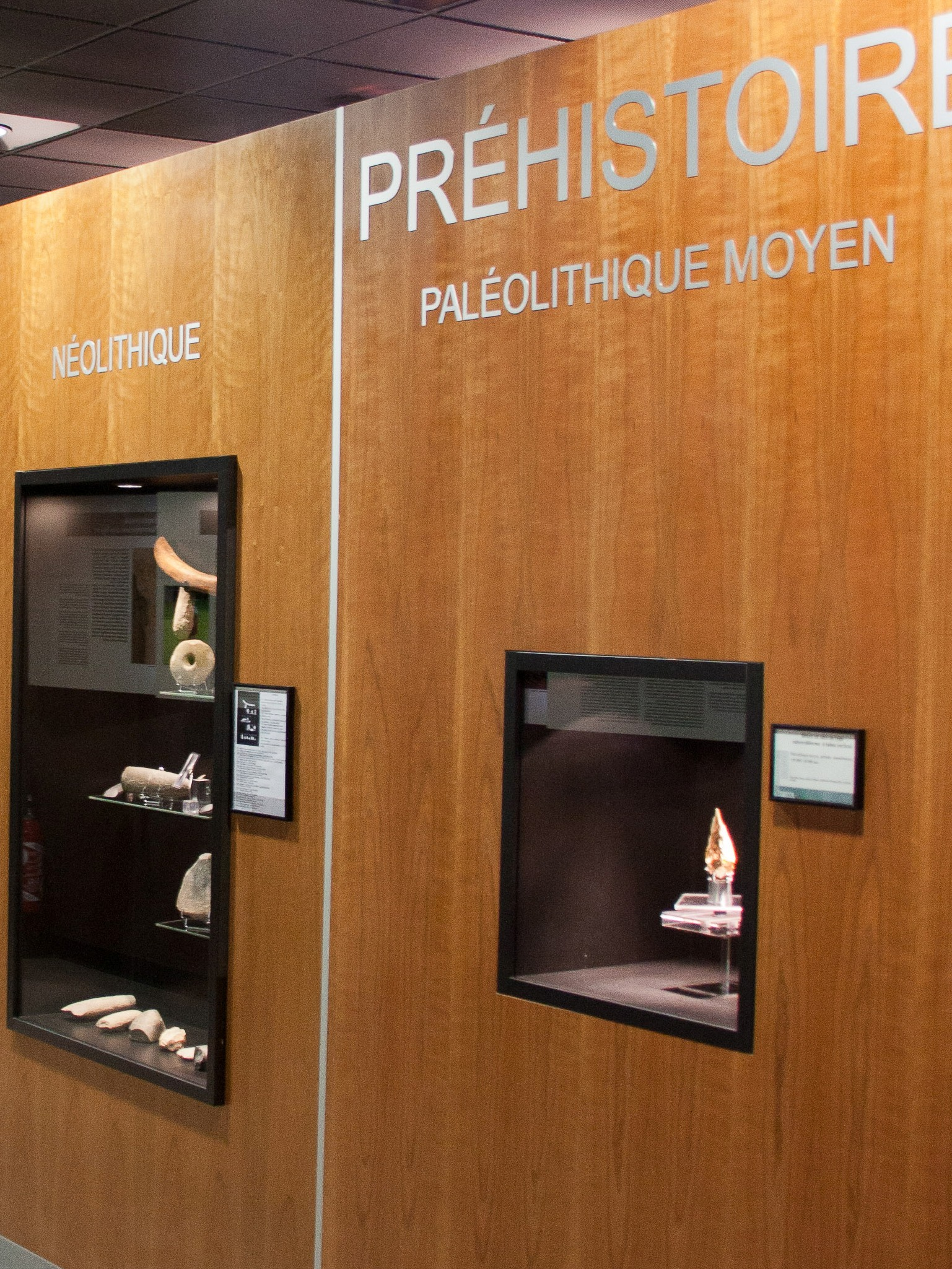 Objets préhistoriques dans l'espace muséographique de Maubourguet / Maubourguet / Hautes-Pyrénées / France